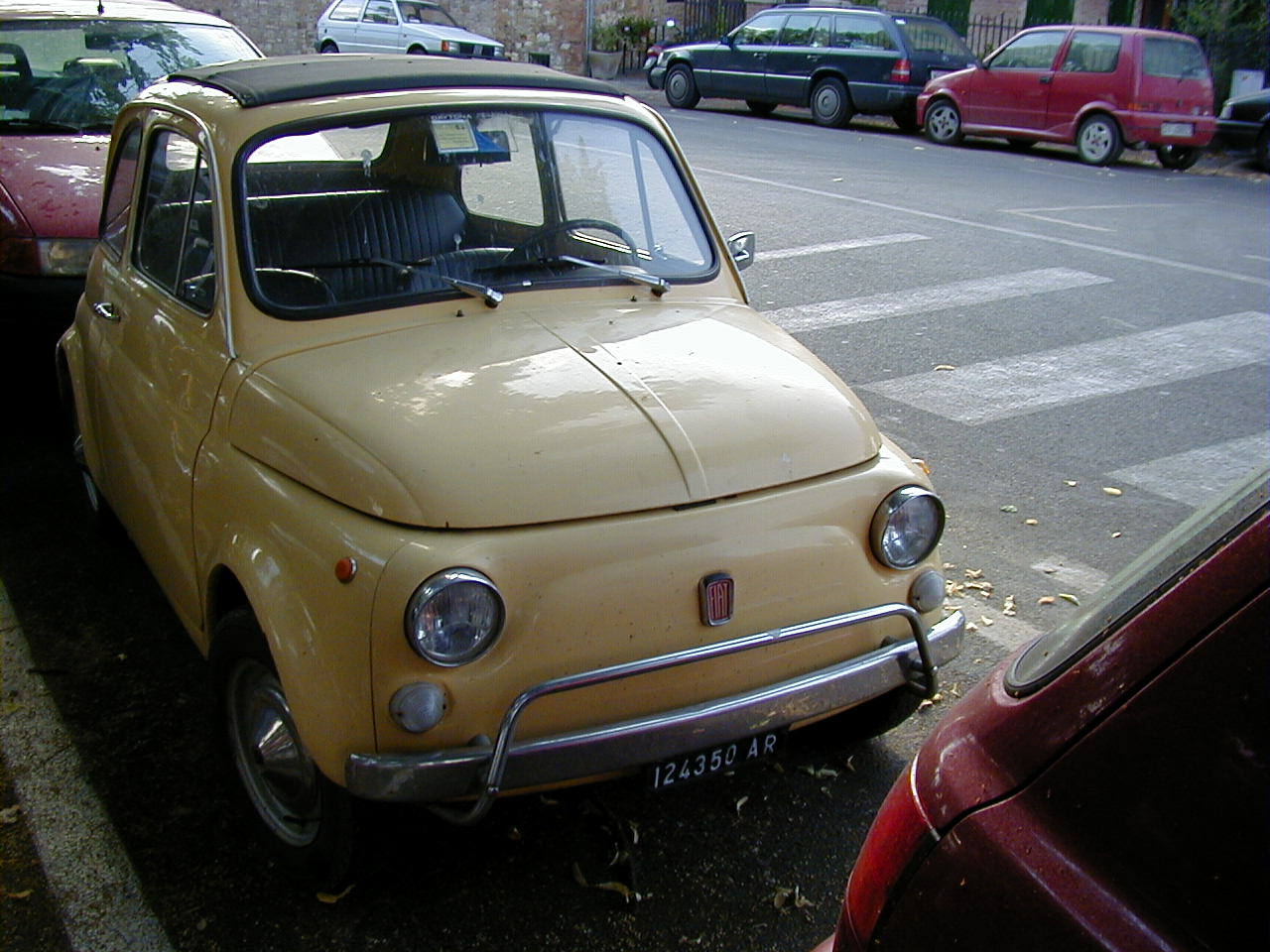 Fiat 500L oldsmobile Etwas heruntergekommener Fiat 500L Oldtimer. Erkennbar an der Chromstange.